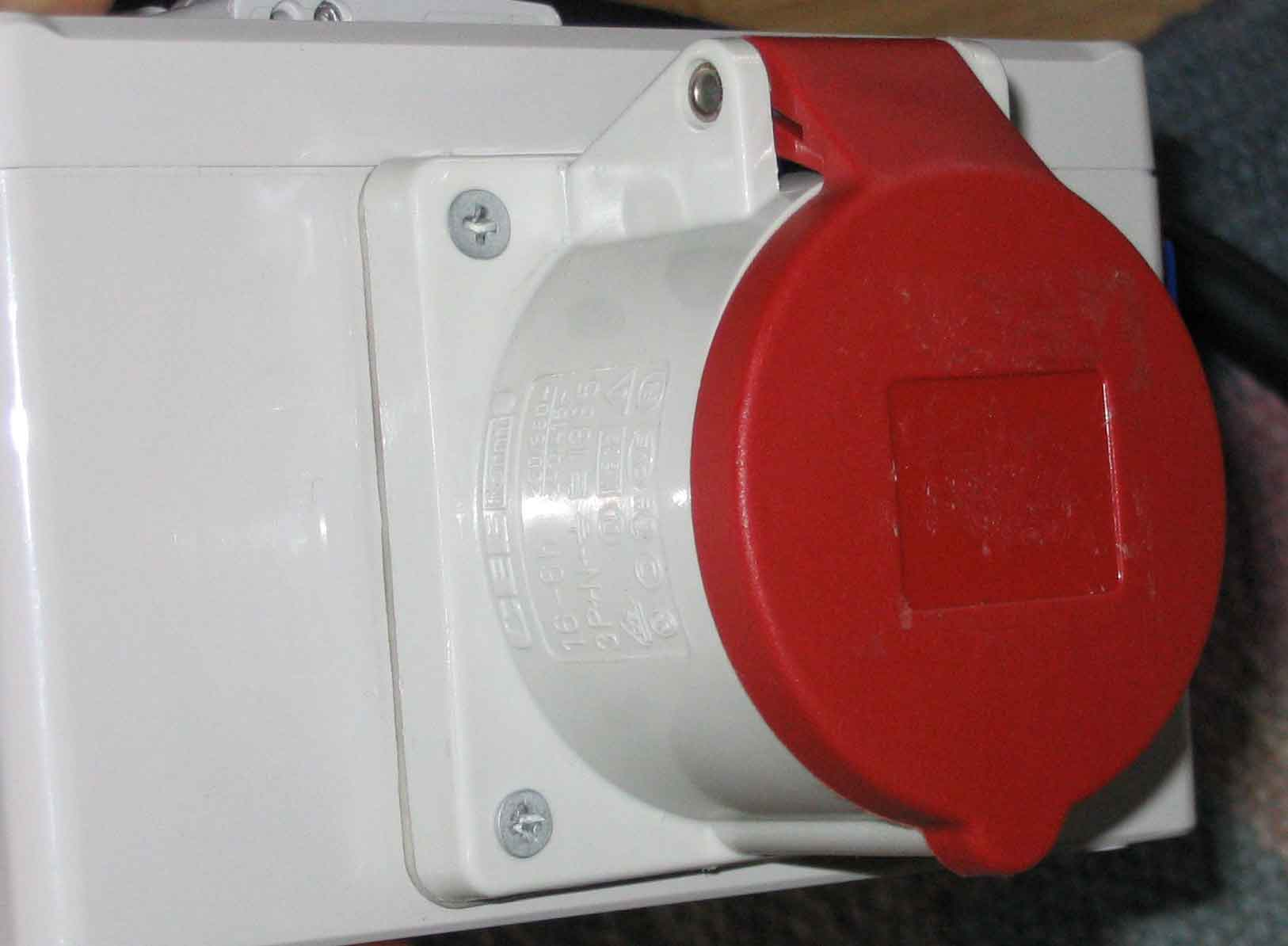 16A CEE-Kupplung der Firma Mennekes. Wackernheim, den 25.08.2005